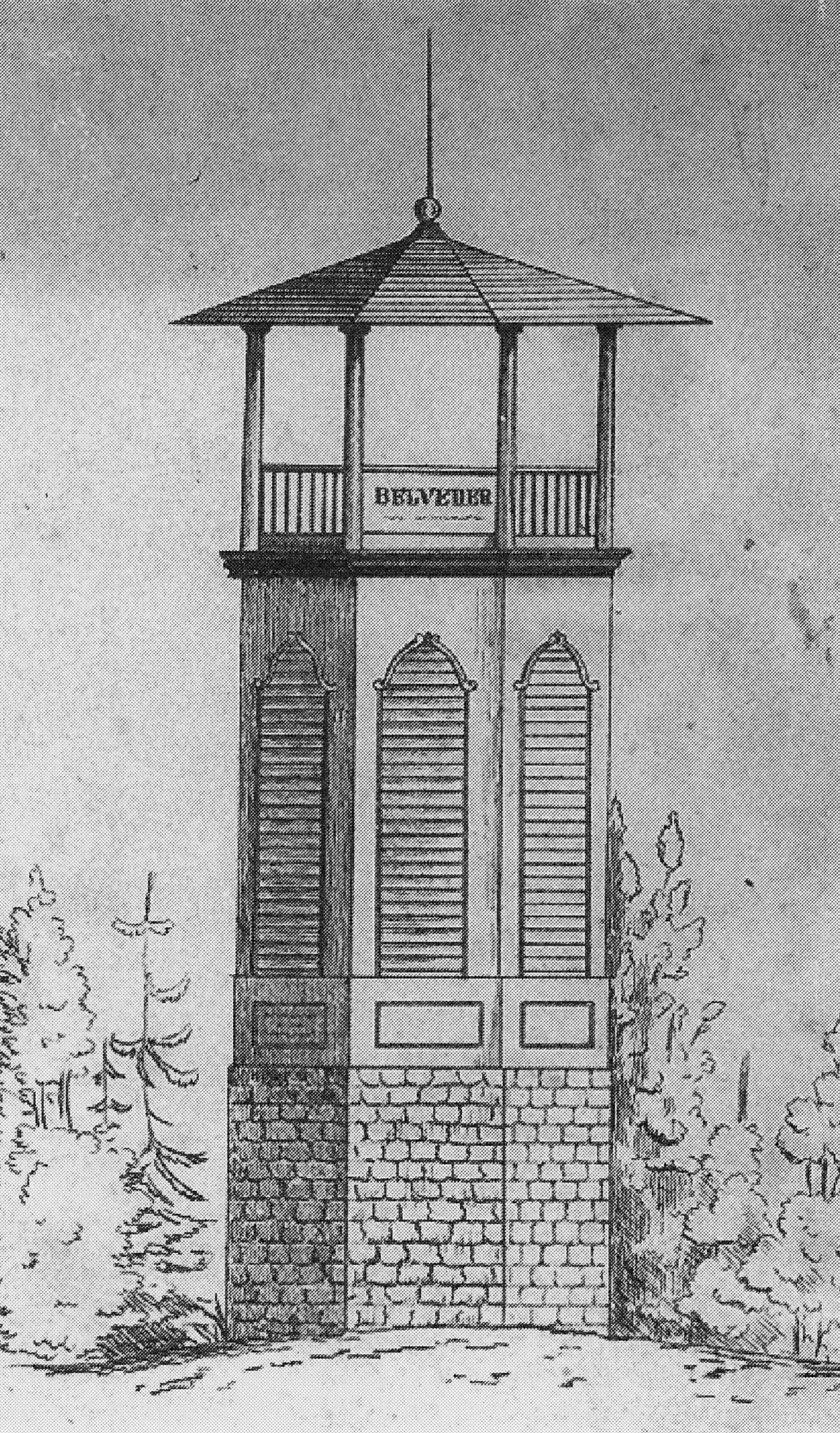 Lithographie mit der Nadel, gezeichnet von W. Heger: Vorgängerbauwerk der Rudolfswarte auf dem Buchkogel (1840), Graz Straßgang